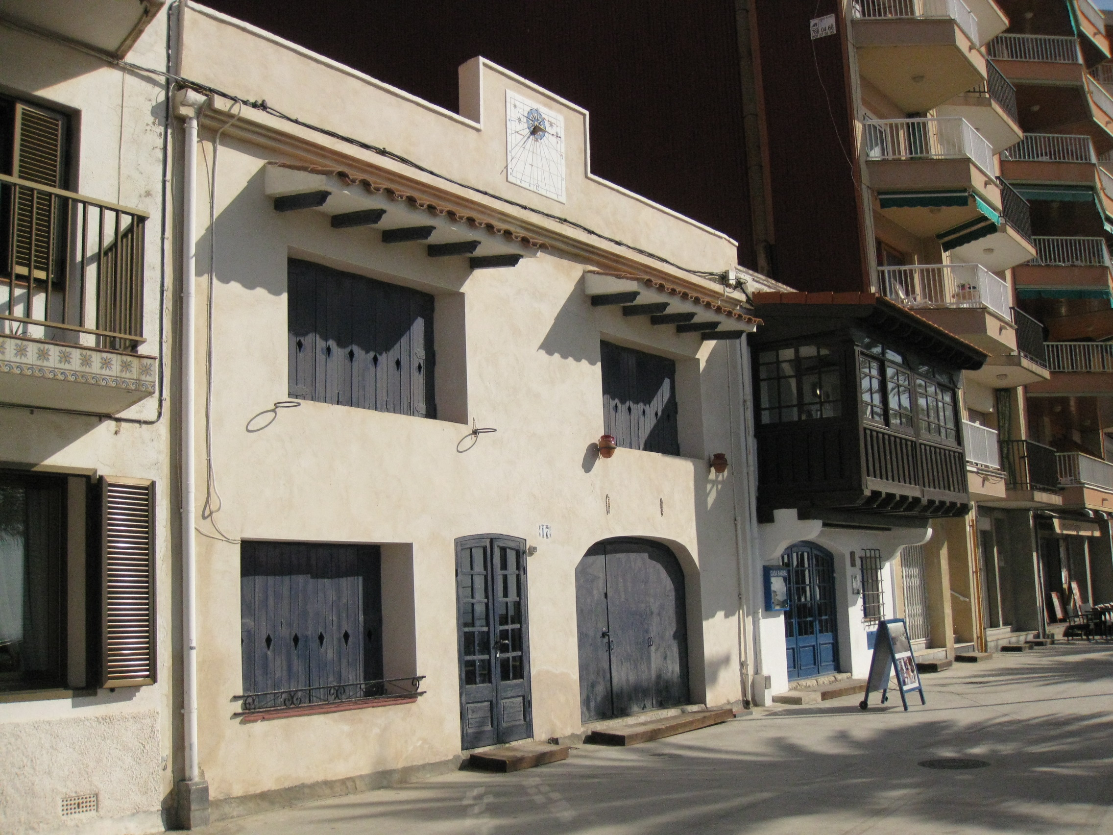 Casa Carlos Barral (Calafell)